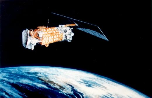 Defense Meteorological Satellite Program